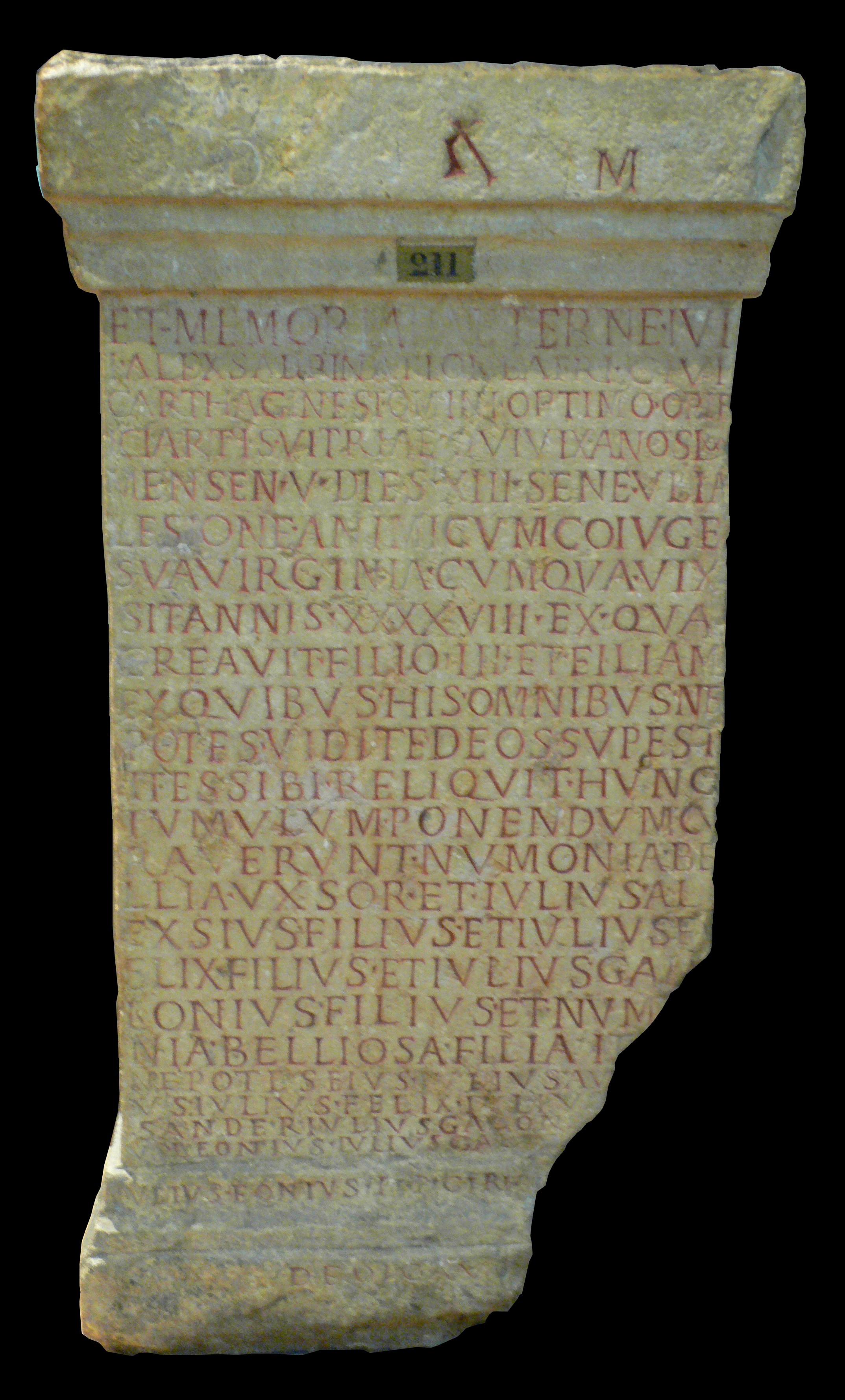 Musée gallo-romain de Fourvière (Lyon) : Stèle funéraire du verrier carthaginois Julius Alexsander